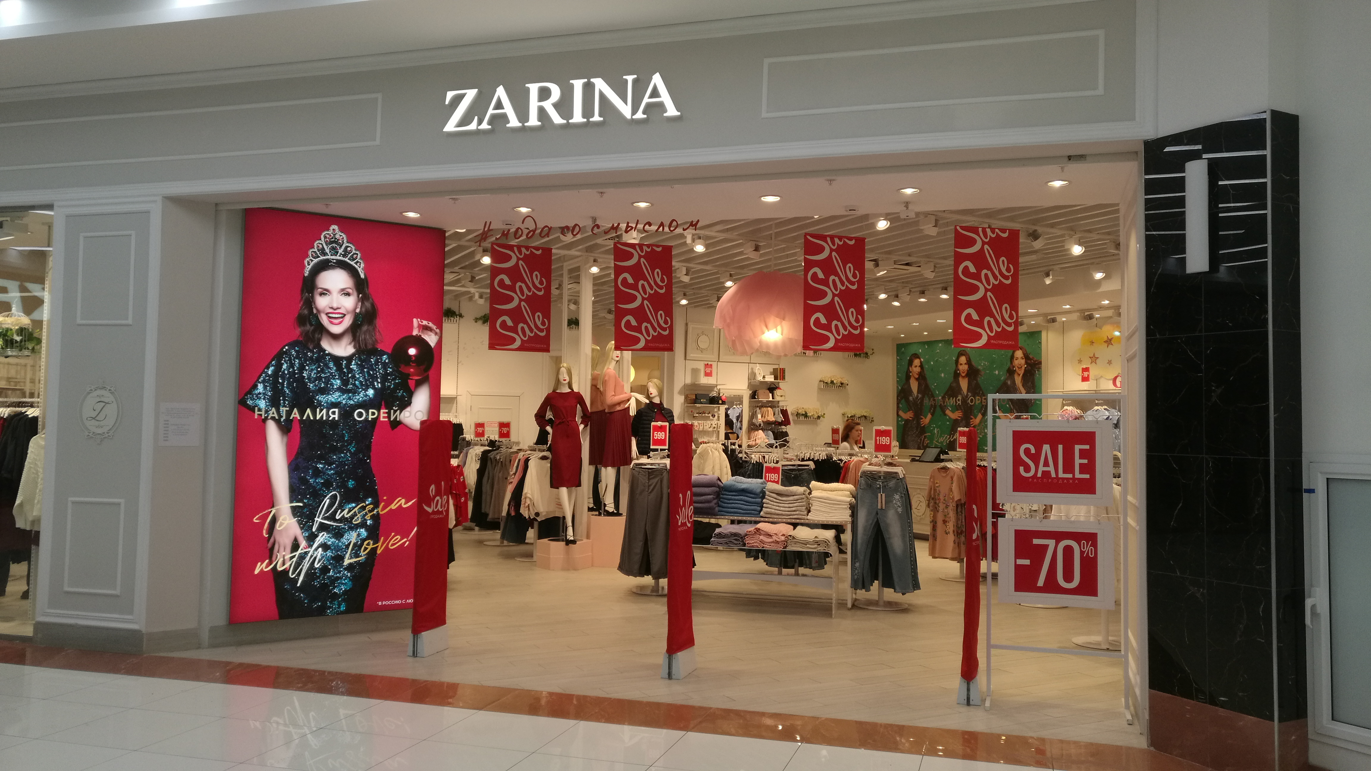 La butiko Zarina en la aĉetcentro Voyage. Tjumeno, Rusio.